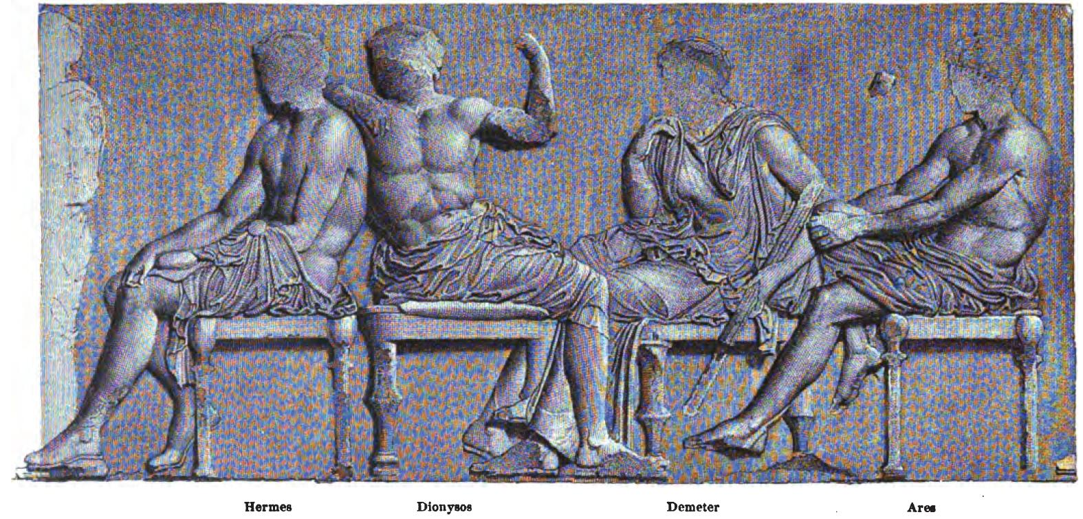 Die Götterversammlung